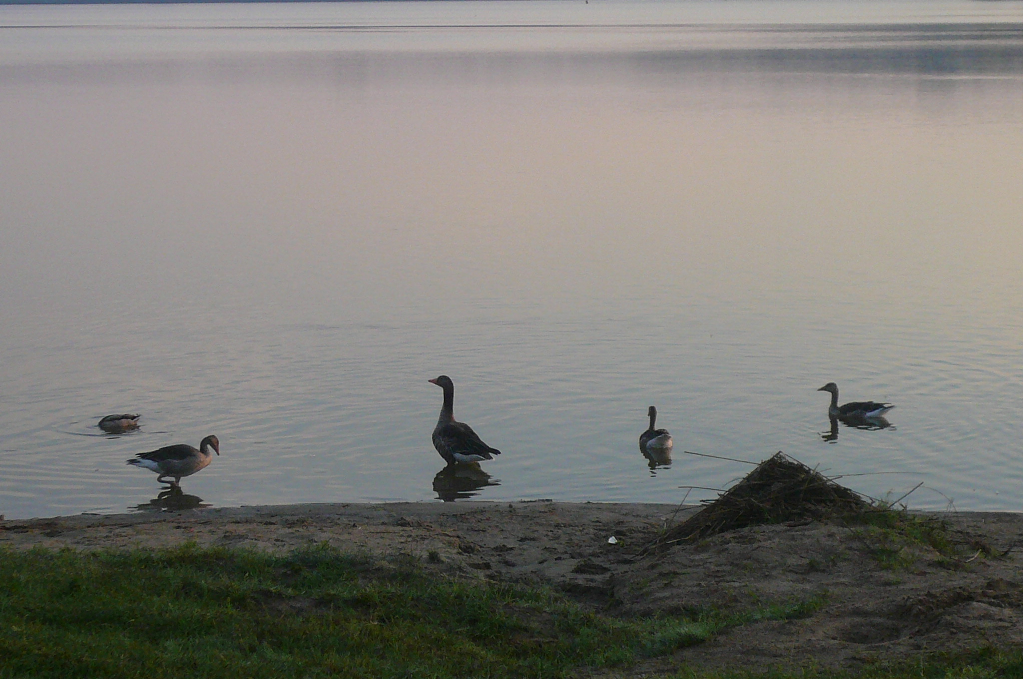 Stado gęsi gęgaw rankiem na brzegu Jeziora Myśliborskiego w Myśliborzu